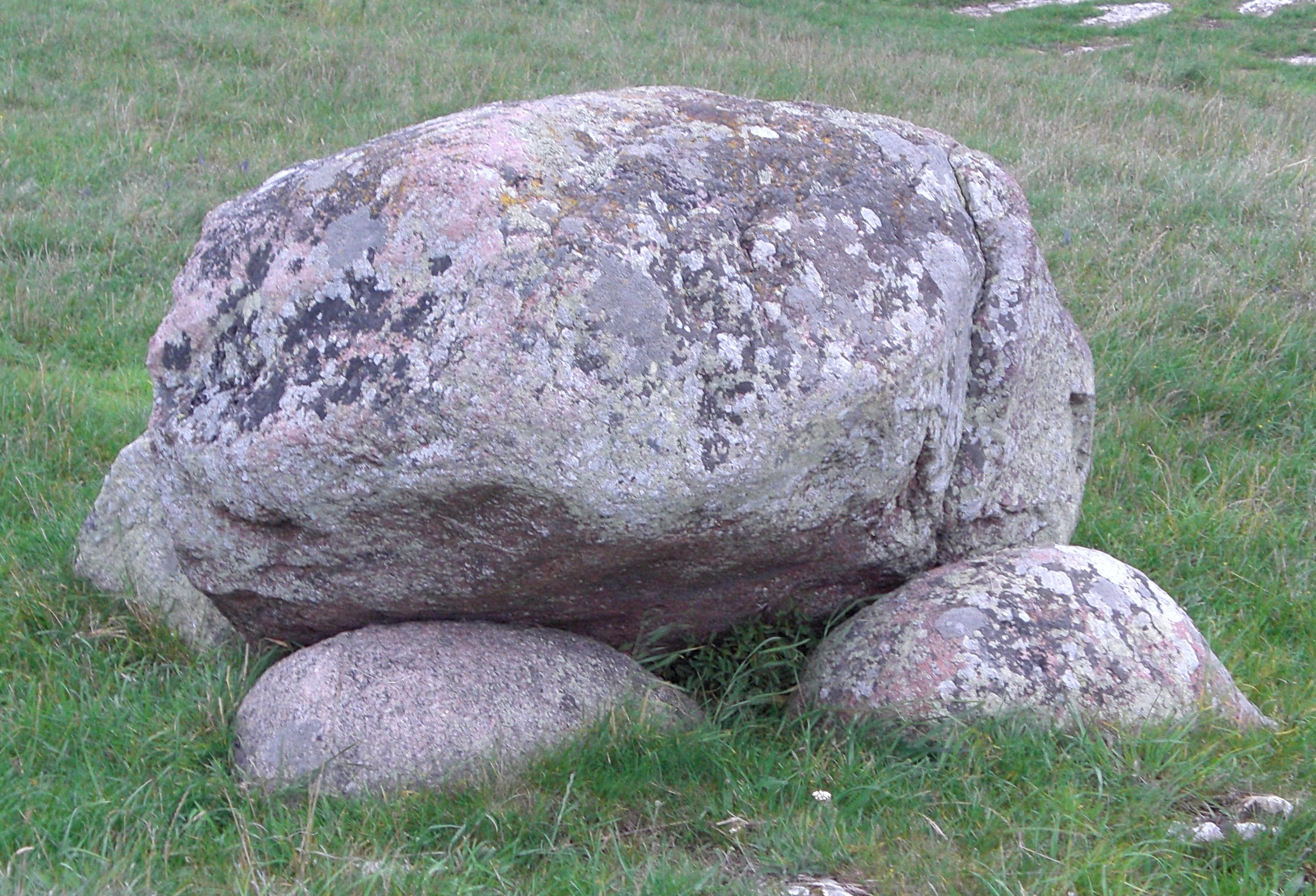 Gräberfeld auf Köpings Kliff, Henne auf Eiern, Öland, Schweden